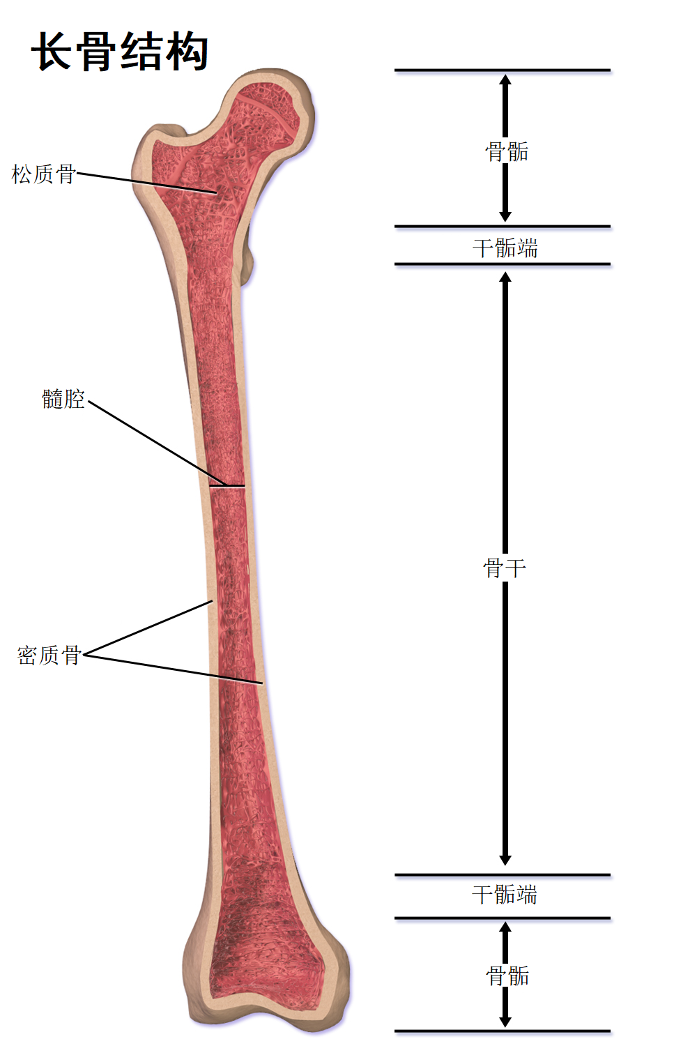 长骨。查看此医学主题的完整动画